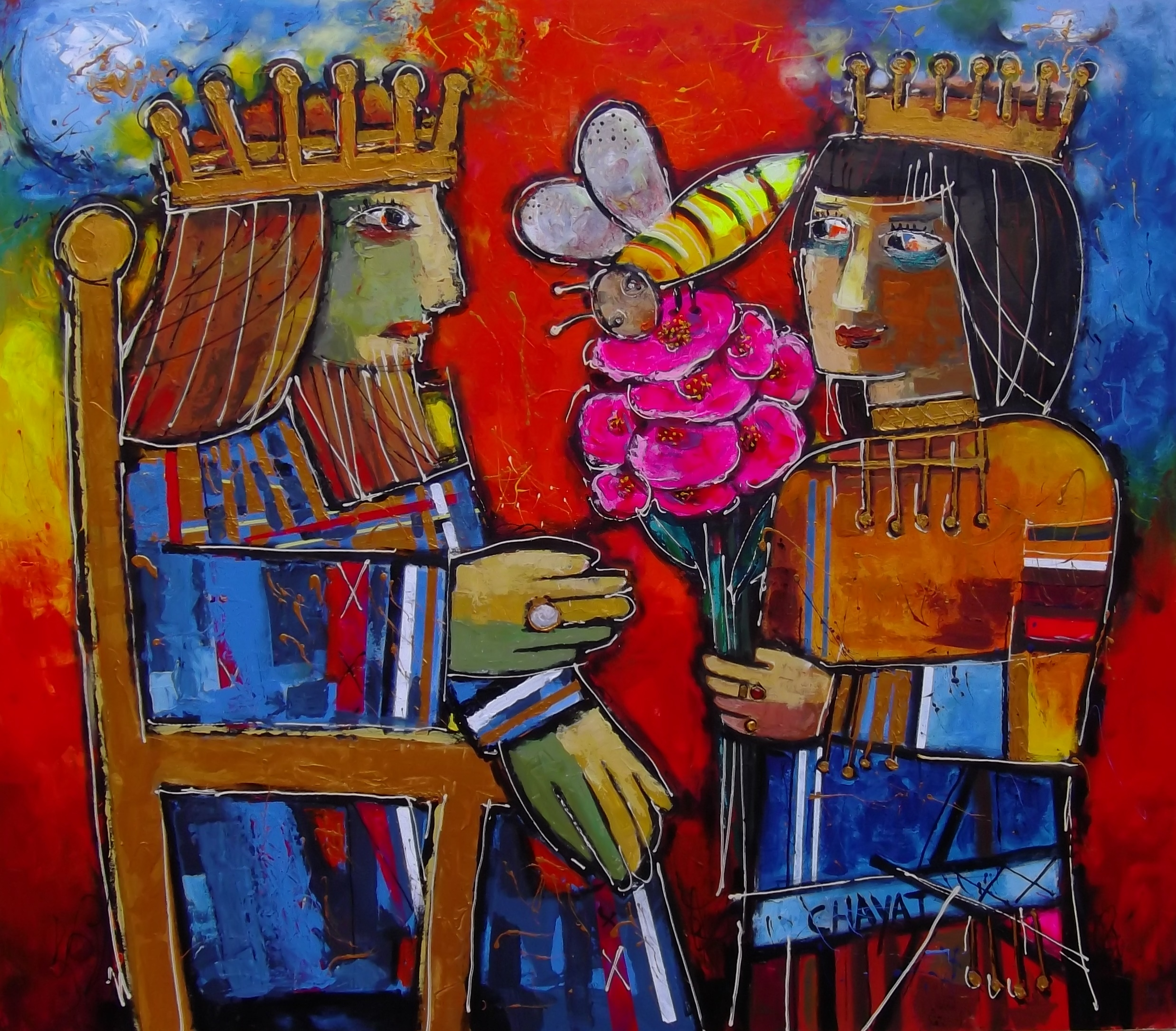 המלך שלמה והדבורה, יעקב חייט